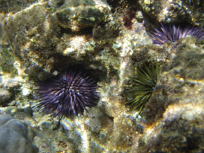 Oursins perforants (Echinometra mathaei) à la Réunion.